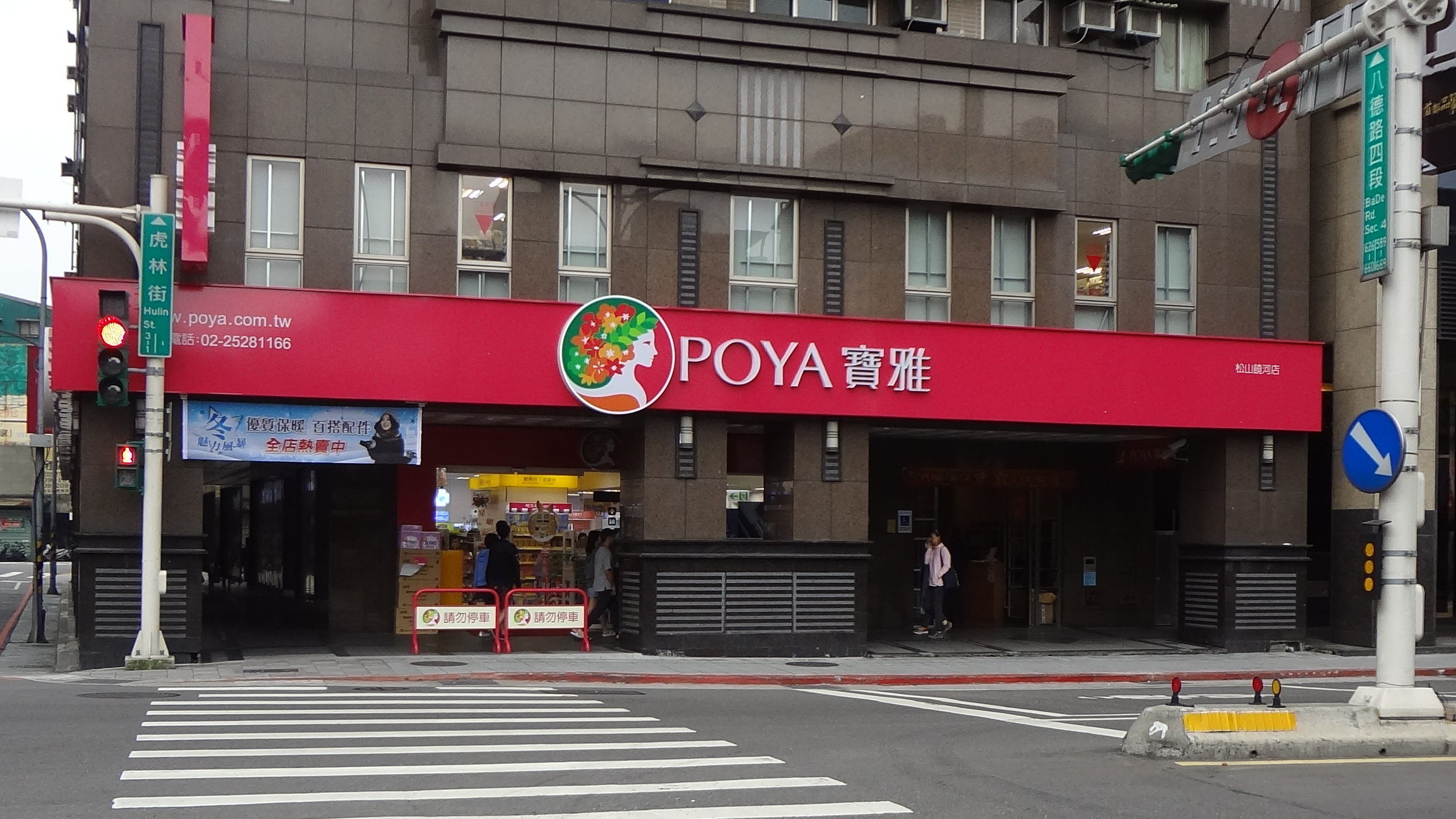 中文（台灣）: 寶雅生活館松山饒河店，地址：臺北市松山區八德路四段660號1樓（東星大樓）。